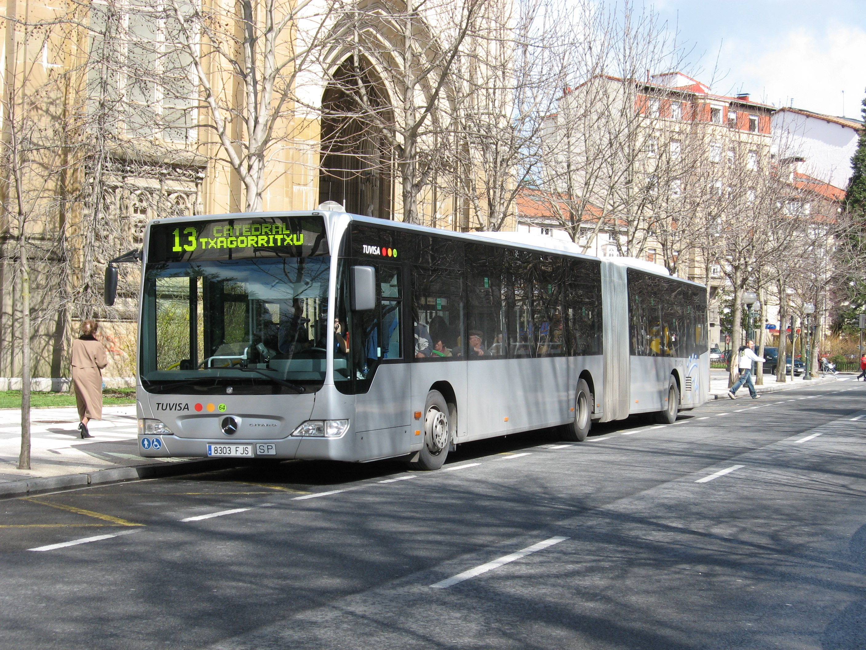 Autobús articulado de TUVISA 64 esperando en la parada de la Catedral Nueva